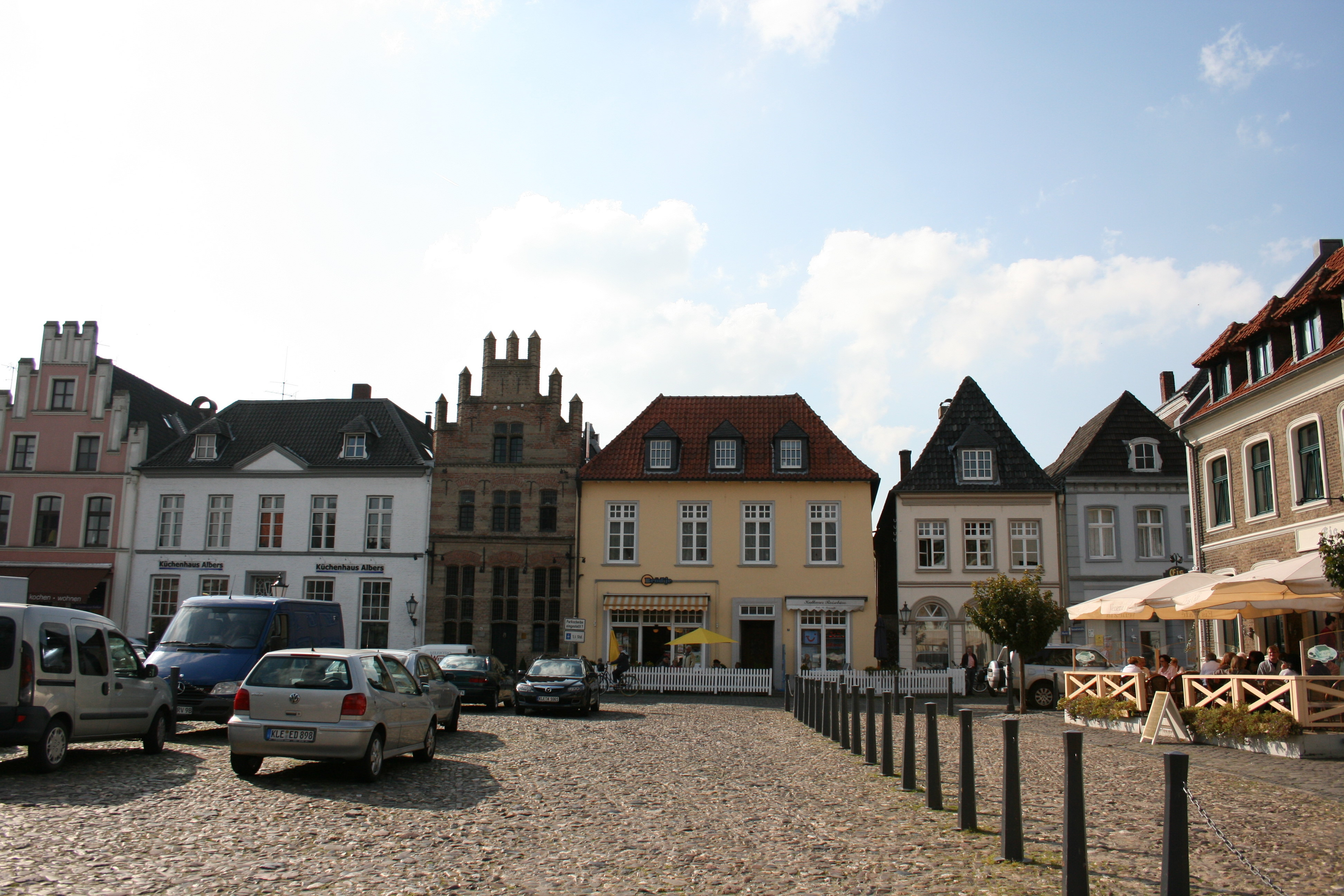 Kalkar